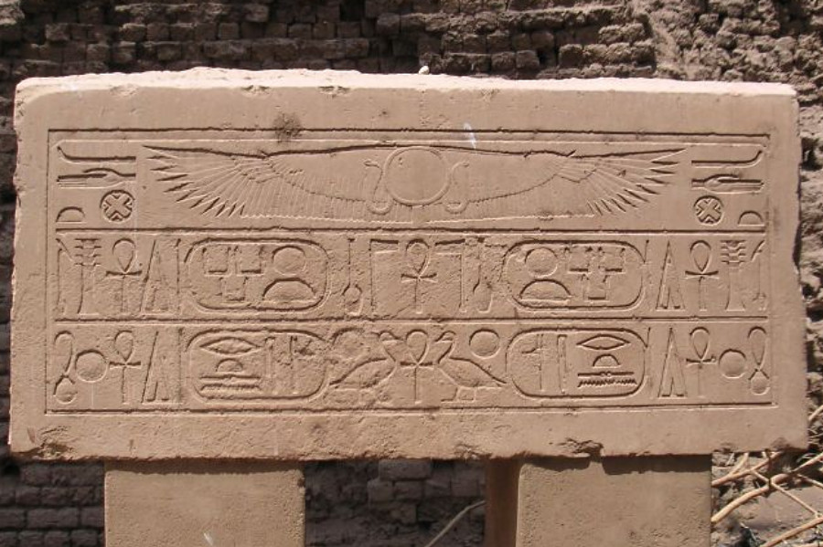 Linteau d'une porte de Sésostris III provenant du temple de Montou à Médamoud - XIIe dynastie égyptienne - Musée en plein air de Karnak